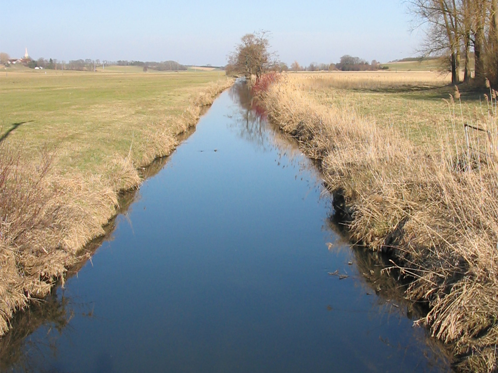 Die Glonn bei Odelzhausen, Ortsteil Taxa, im März 2004.